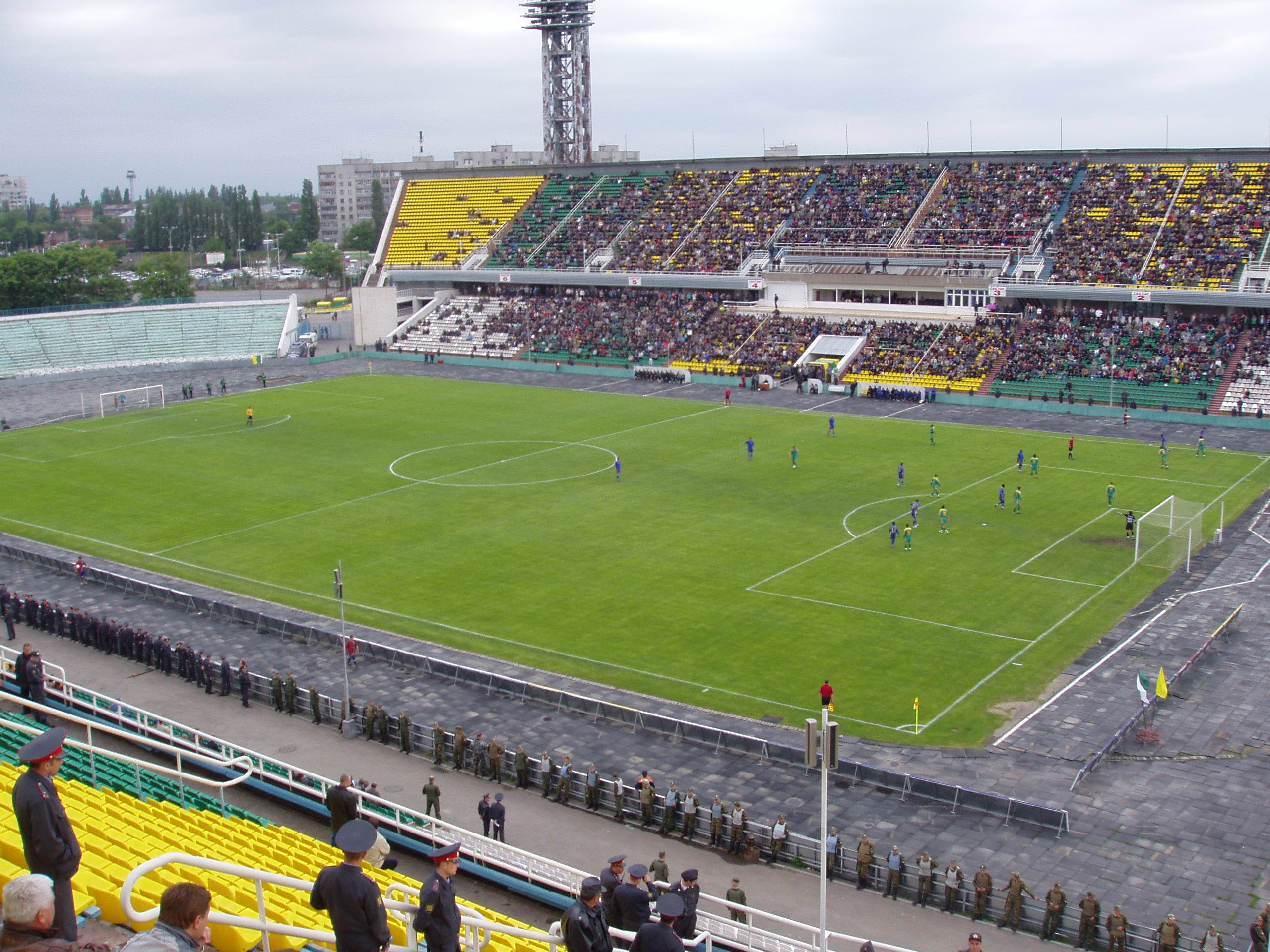 Kuban Stadium, Russia